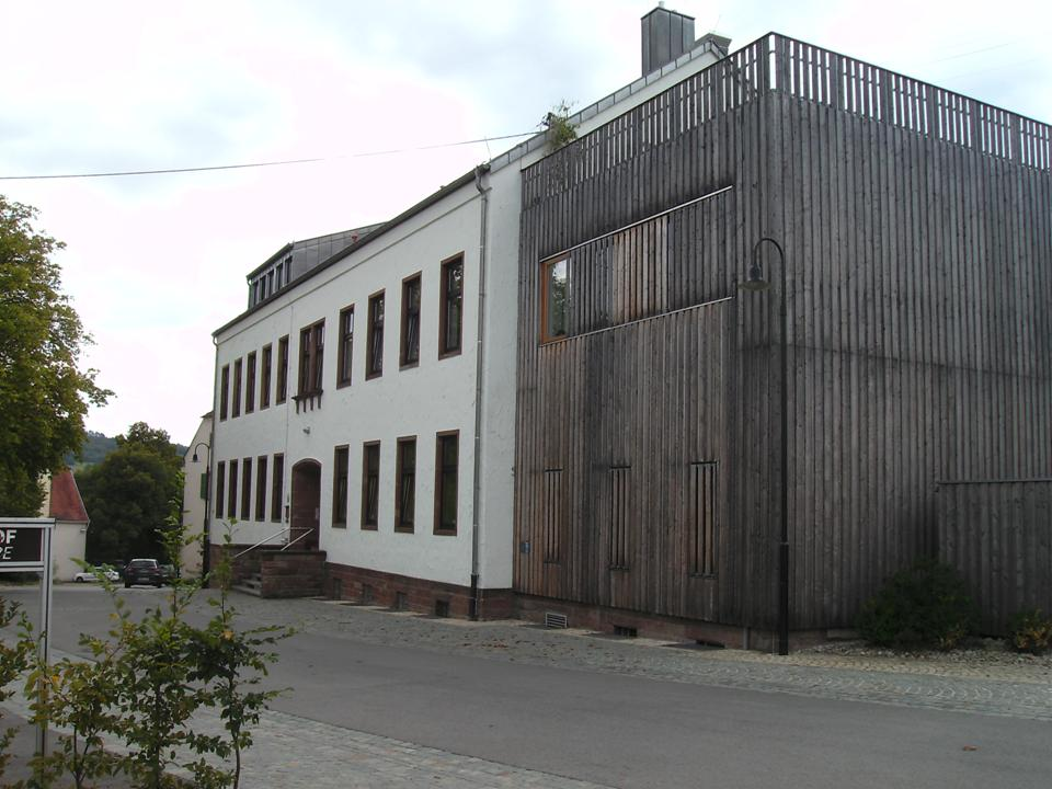 Spohns Haus: ehemal. Schulgebäude